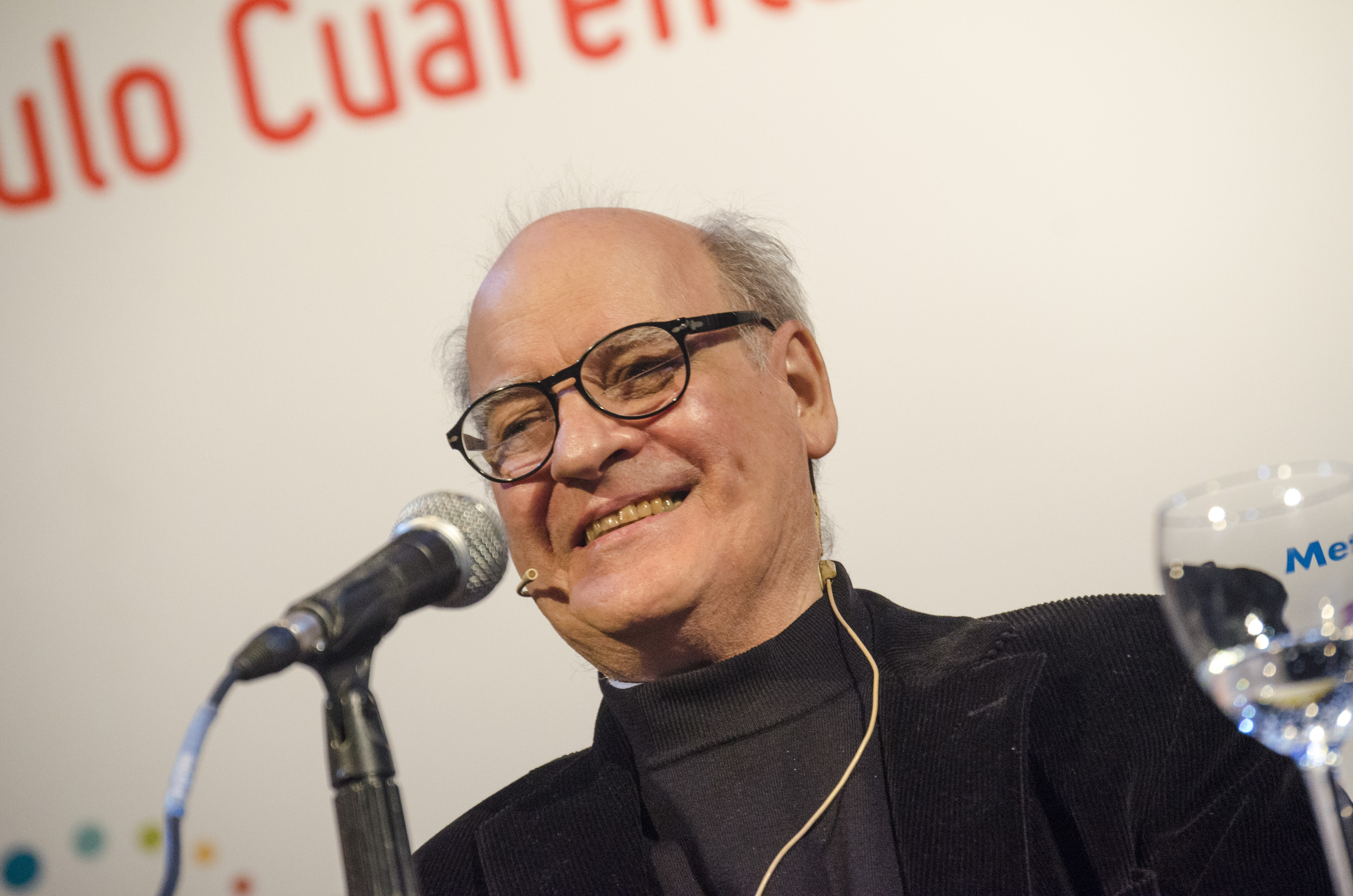 Buenos Aires, 24 de abril de 2014 - Se llevó a cabo la apertura oficial de la Feria Internacional del Libro de Buenos Aires. Particparon el director de Industrias Culturales, Rodolfo Hamawi; el ministro de Educación, Alberto Sileoni; el ministro de Cultura porteño, Hernán Lombardi; y el presidente de la Fundación El Libro, Gustavo Canevaro. En el cierre, Quino fue entrevistado por Cristina Mucci y Carlos Ulanovsky. Fotos: Romina Santarelli / Secretaría de Cultura de la Presidencia de la Nación.